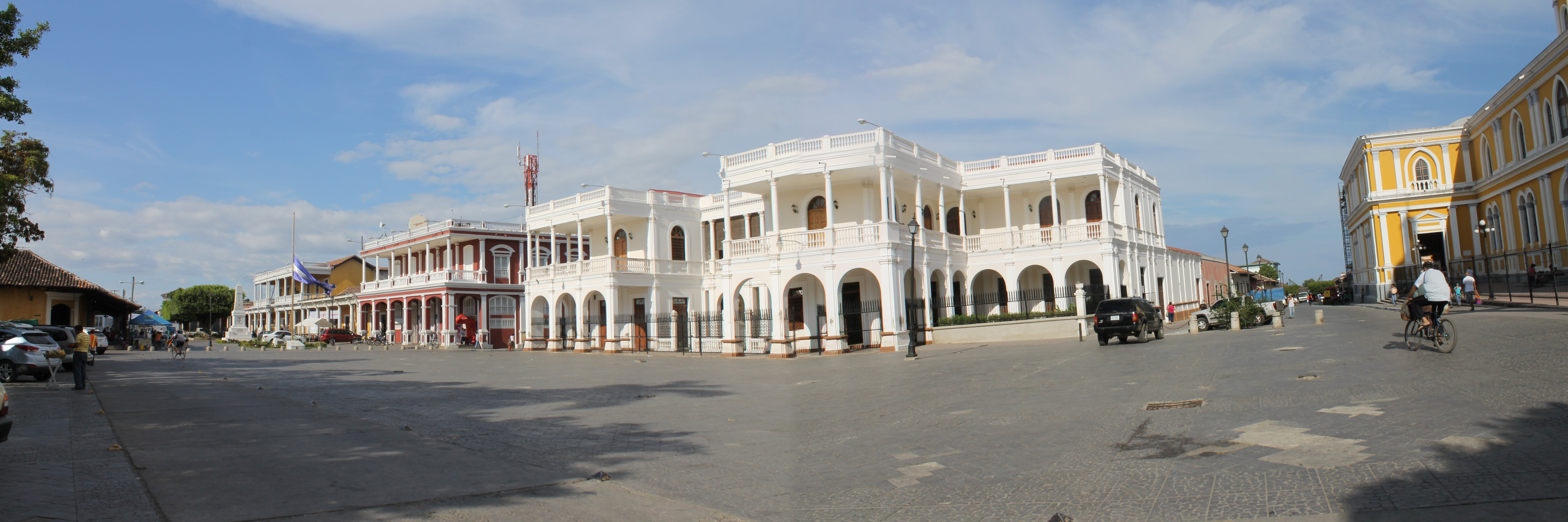 Calles de la localidad de Granada, Nicaragua.